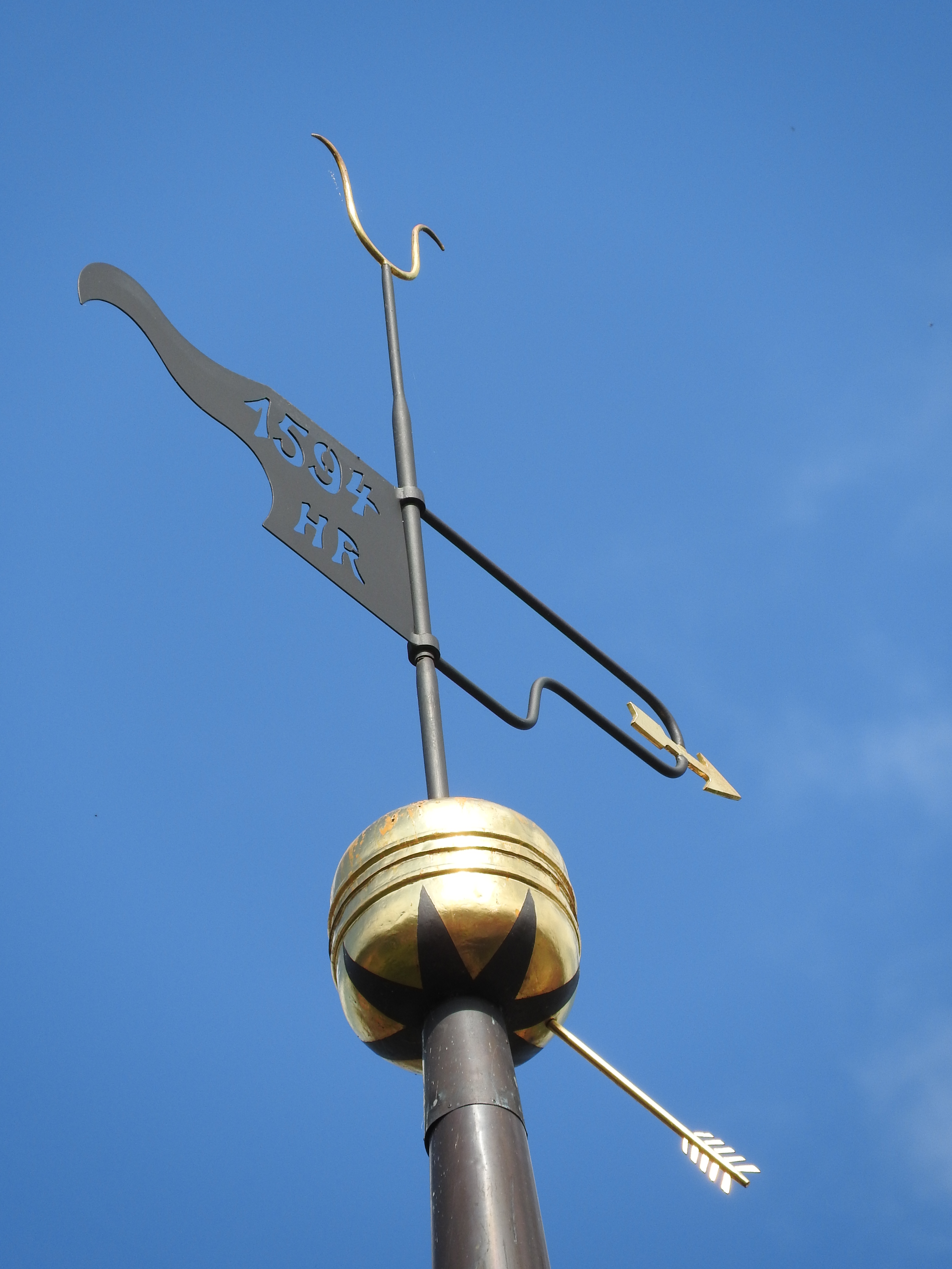 Wetterfahne mit Pfeil auf der Kirche in Schwarza, Rudolstadt, Thüringen